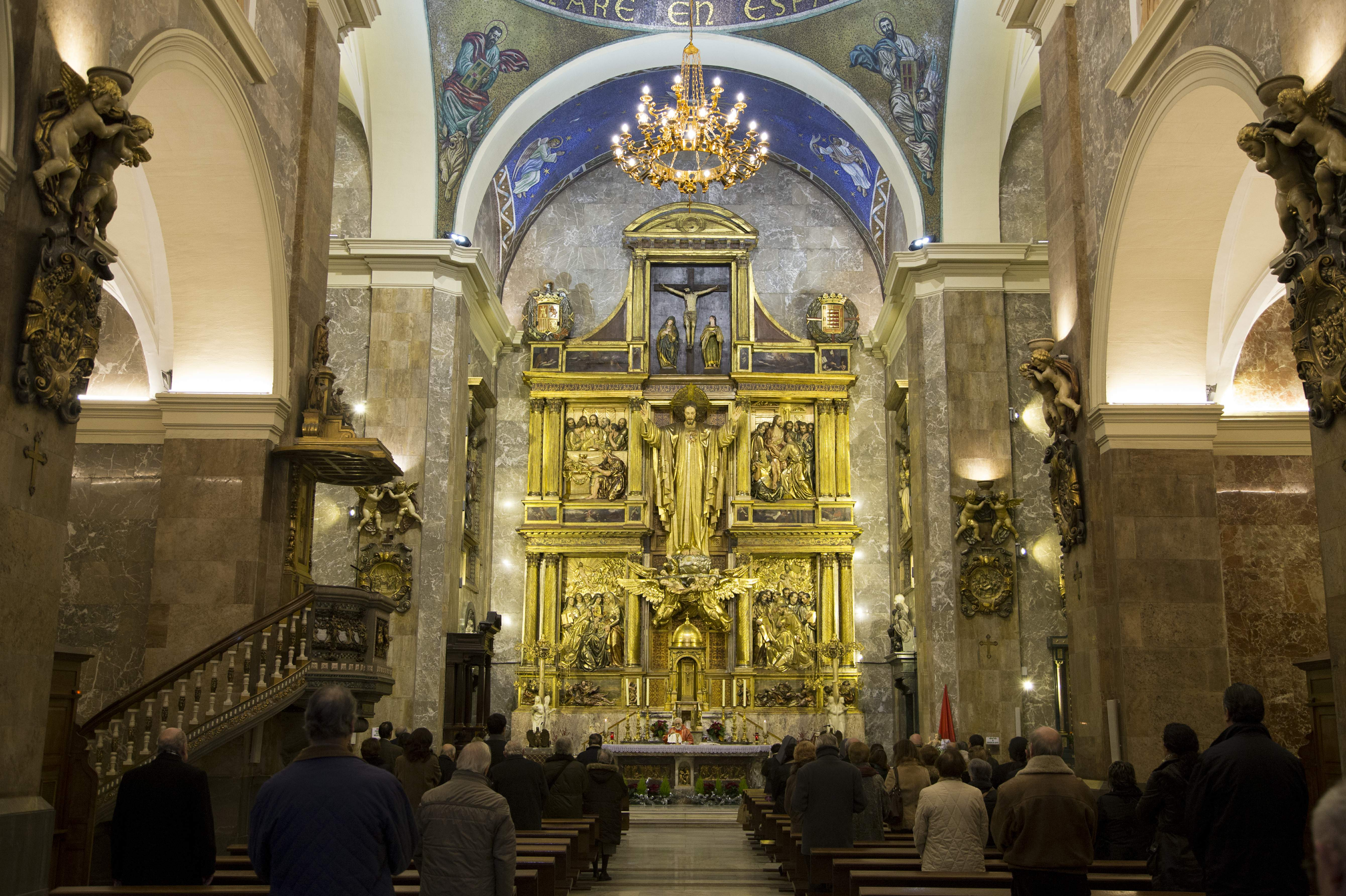 Fotografía: Ángel Cantero / Enero 2014_ Detalles de la reforma de iluminación y restauración del retablo de la Basílica Santuario Nacional de la Gran Promesa de Valladolid realizado por el taller de restauración de Las Edades del Hombre. s del Hombre.